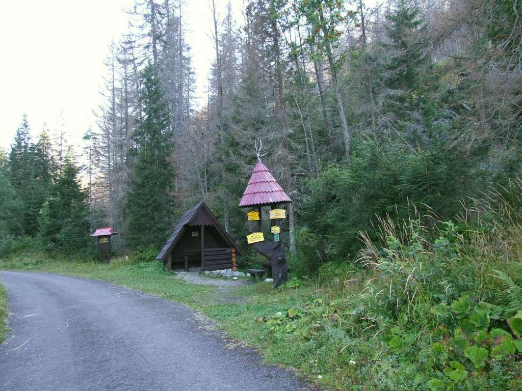 Rozdroże pod Gronikiem (Dolina Koprowa, Tatry)